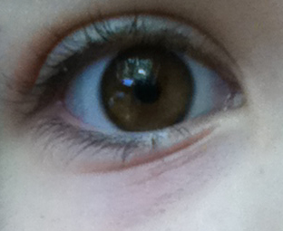 Ein Foto eines Auges mit Dennie-Morgan-Falte